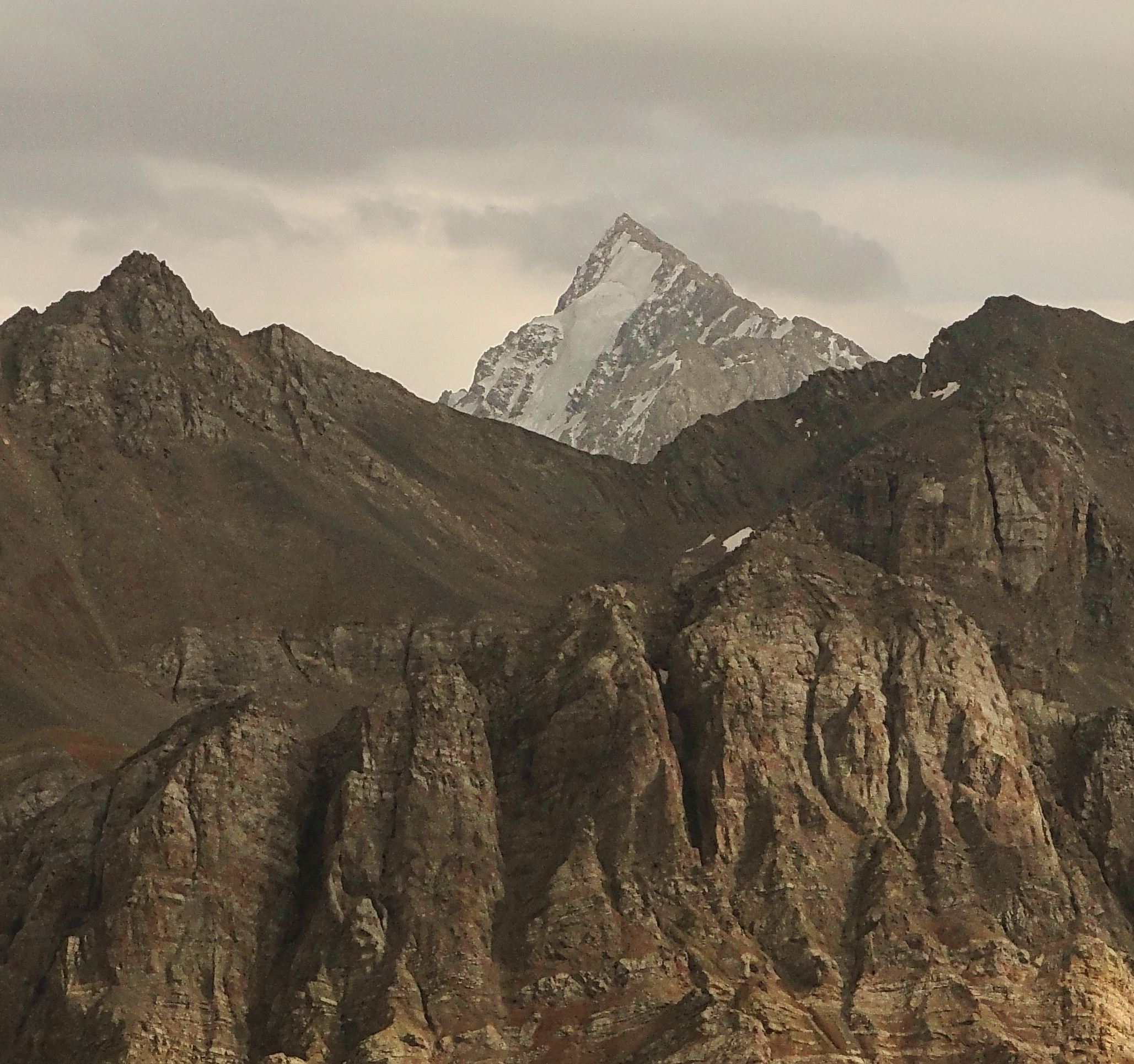 пик Бештор, Пскемский хребет, Узбекистан